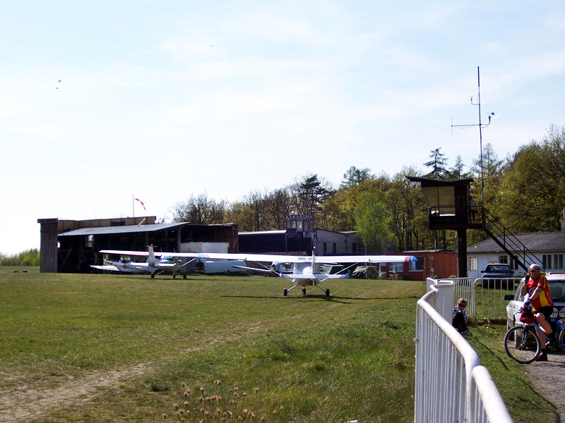 Sportovní letiště Praha-Točná